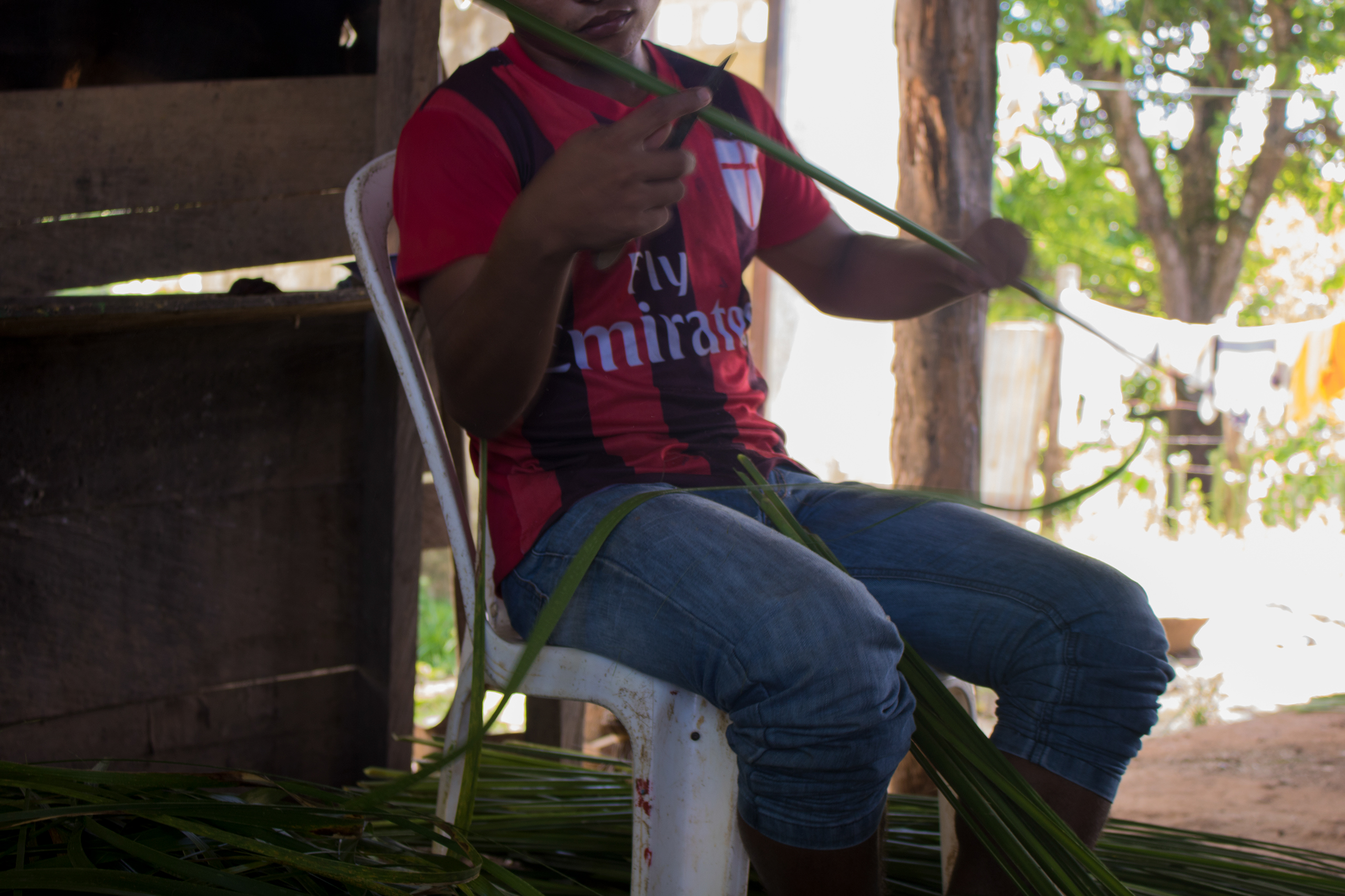 Hombre de la vereda flechas, en el municipio de San José de Uré realizando la raspa de la caña flecha (Gynerium sagittatum)